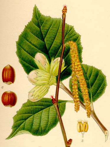 Corylus avellana, Hassel